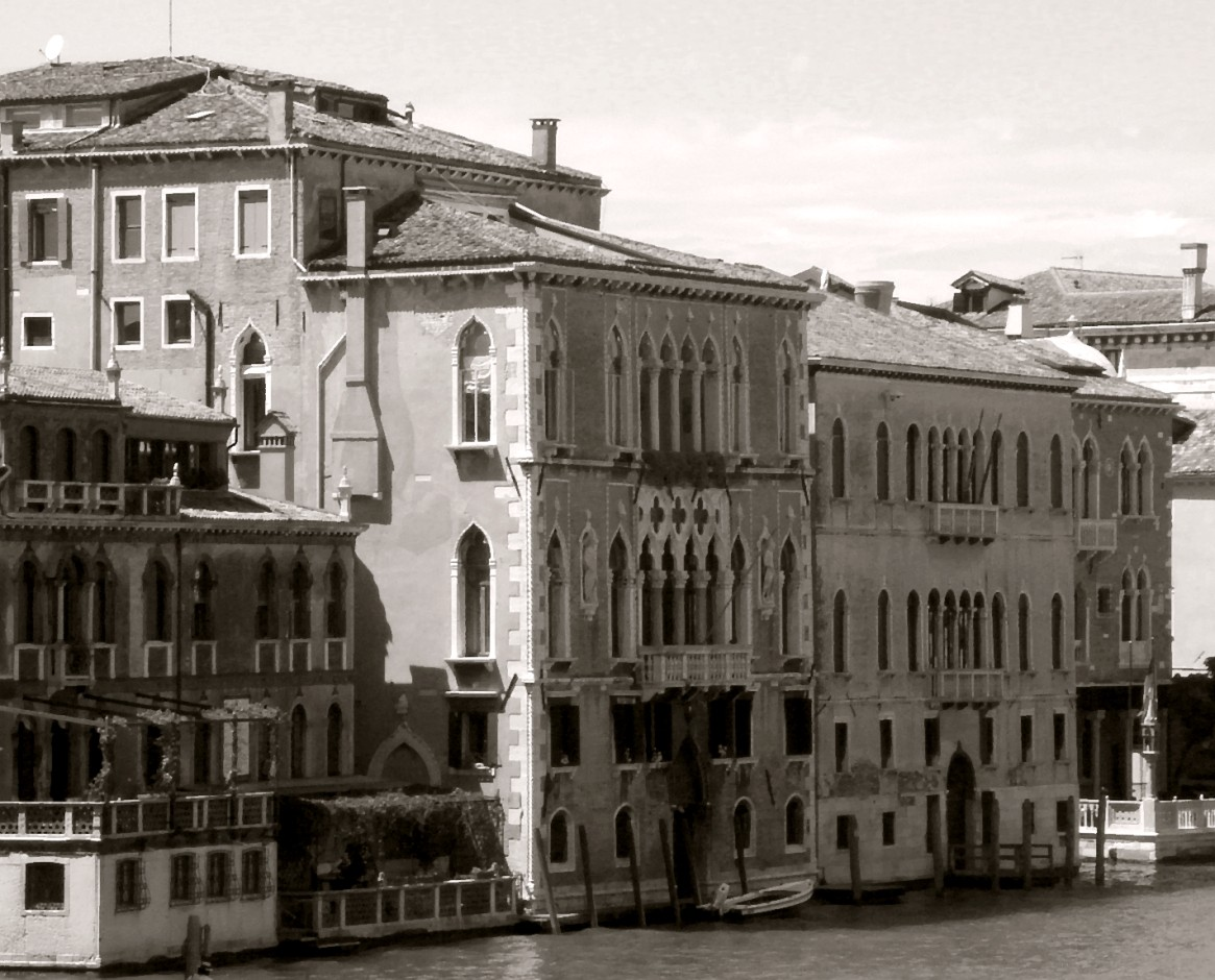 Venezia: Palazzo Loredan dell'Ambasciatore e Palazzo Moro dal Ponte dell'Accademia.